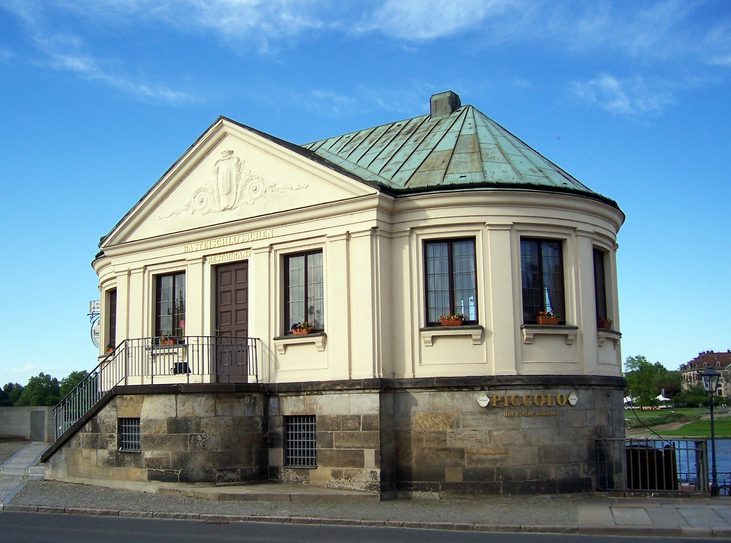 Das Basteischlößchen am Theaterplatz an der Semperoper hinter dem Italienischen Dörfchen in Dresden.